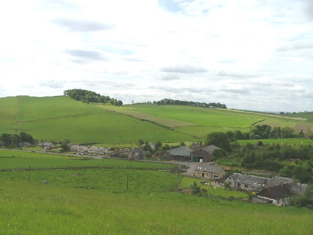 Abernyte Village